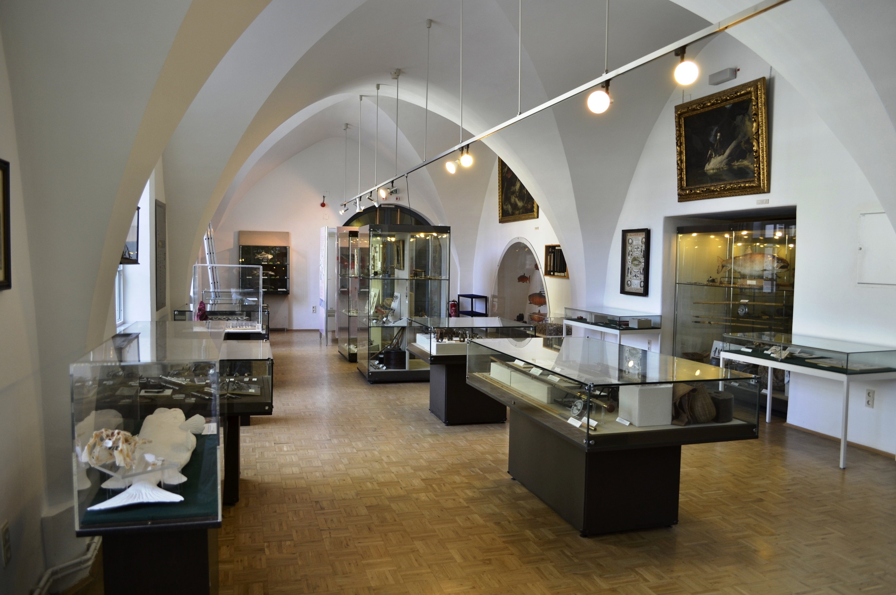 Im Inneren des Jagd- und Fischereimuseums in München - Fischereiabteilung.